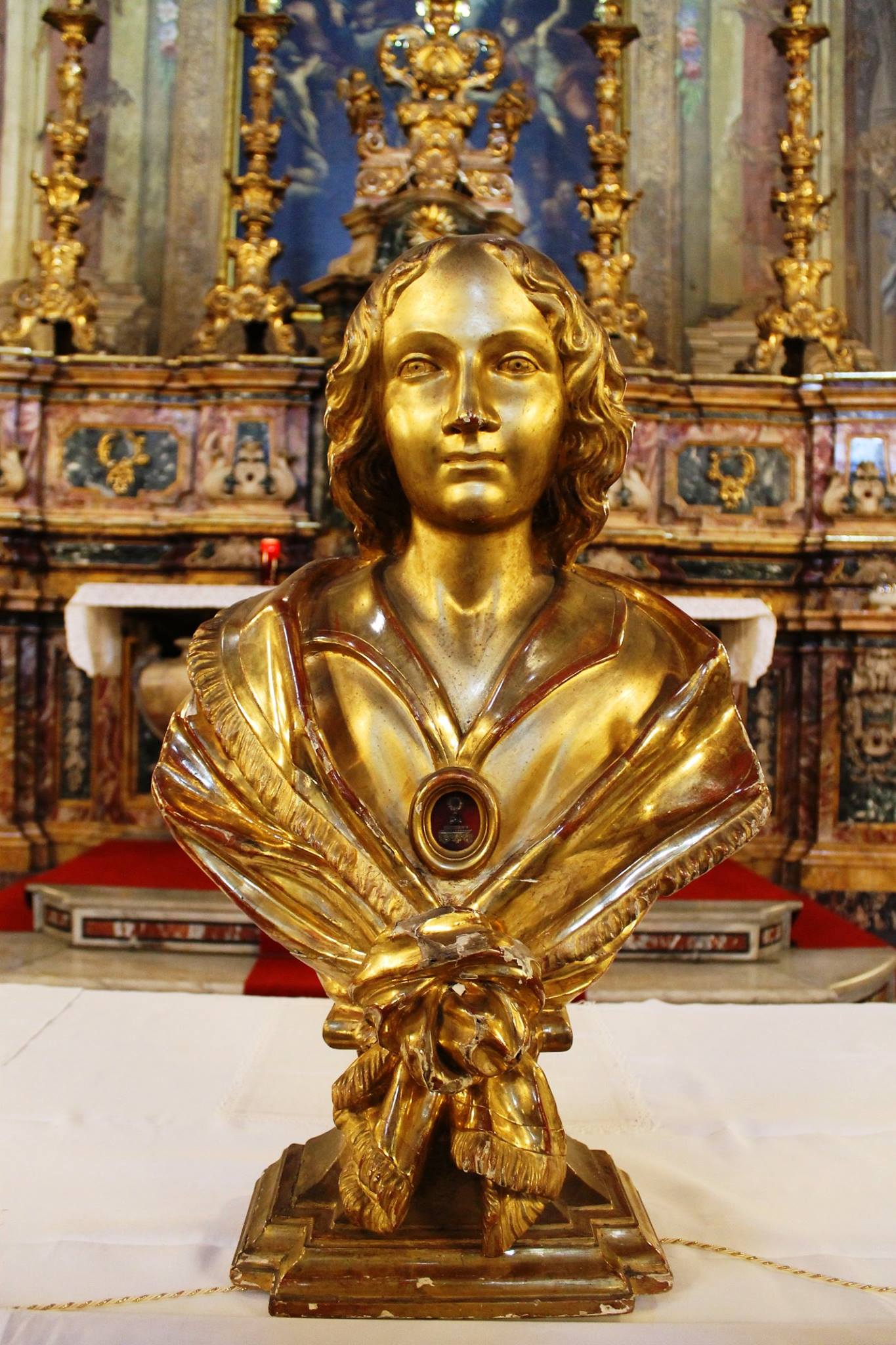 Busto reliquiario di San Cesario diacono e martire che si conserva nella Chiesa di Santa Brigida, Napoli (foto Daniela Matarazzo)